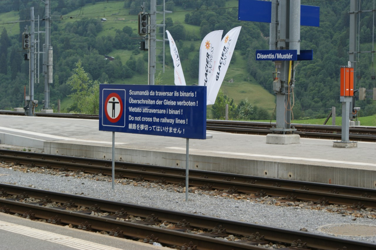 Bahnhof Disentis. Warnschild in fünf Sprachen, zuoberst Rätoromanisch (Rumantsch Grischun)